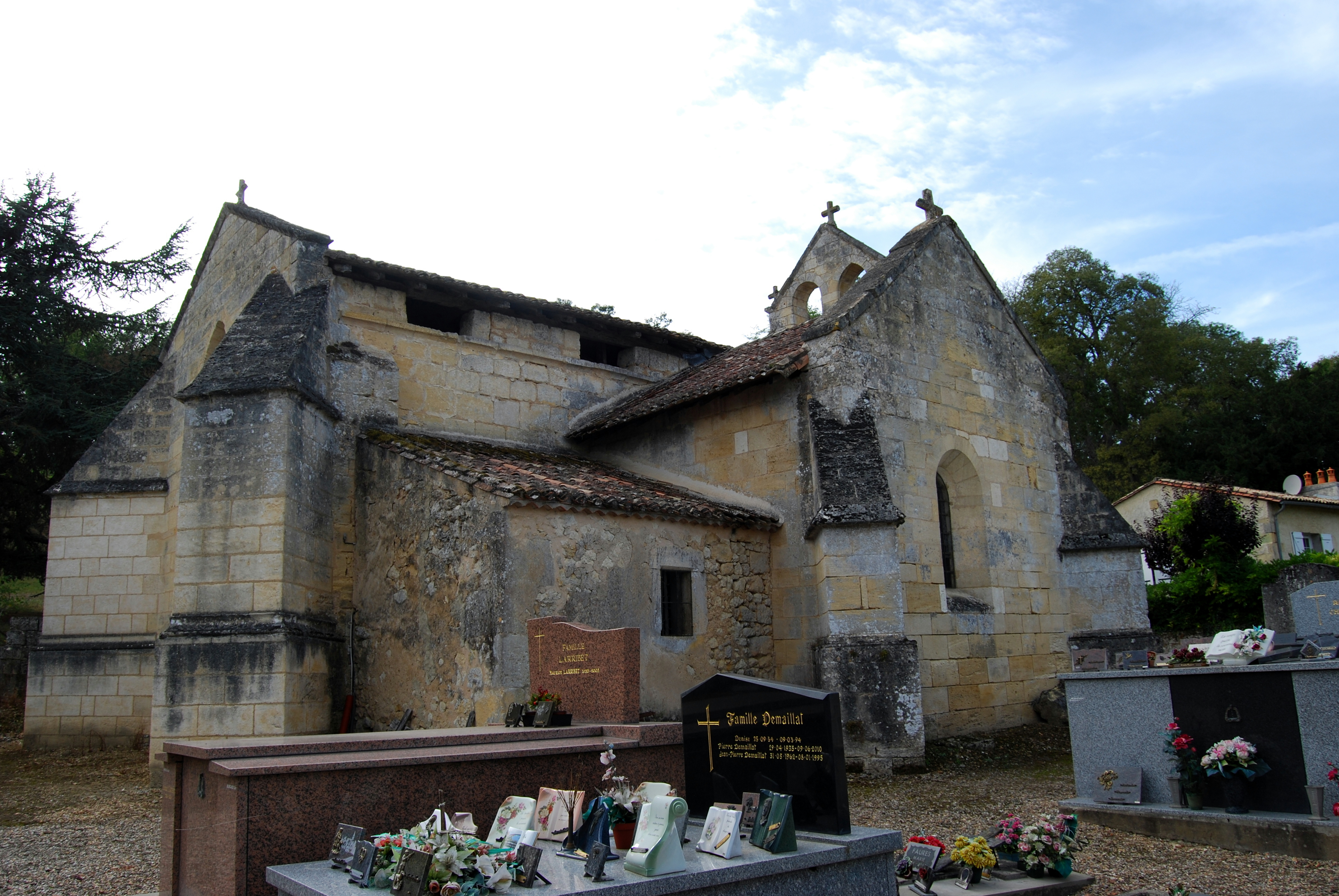 Église Sainte-Eulalie de Cadarsac, (Inscrit, 1925) .